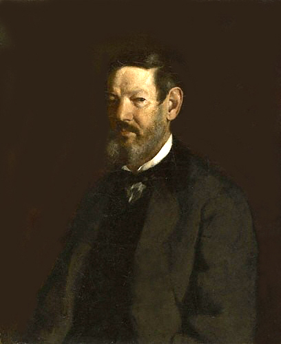 Dailininko tėvas, tapytojas, visuomenės veikėjas, Vilniaus archeologinės komisijos narys